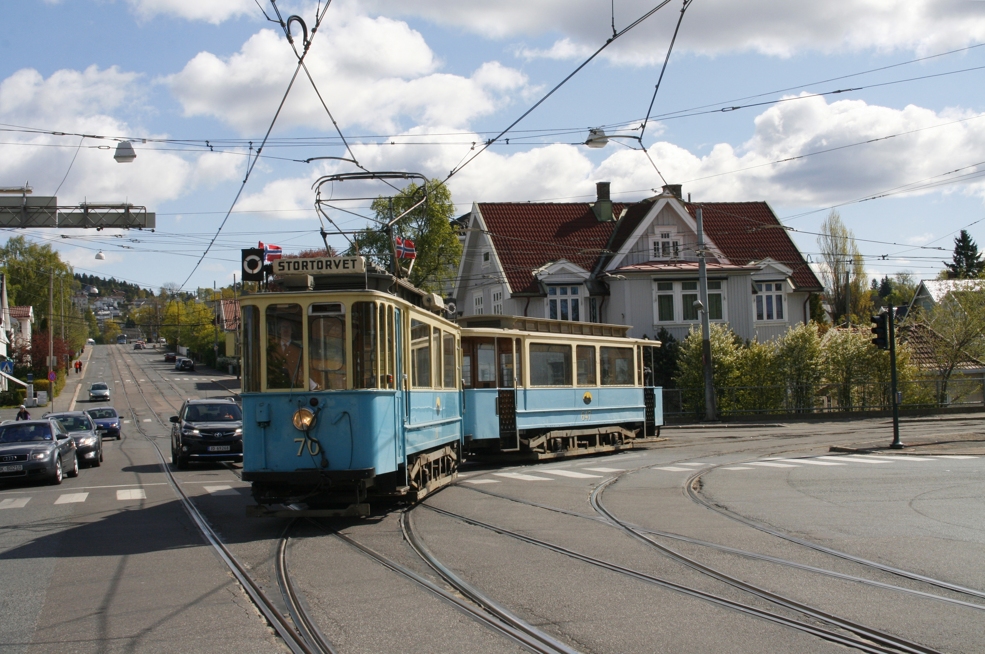 Motorvogn nr. 70 og tilhenger nr. 647 ved Storo